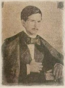 Photo de Jorge Isaacs prise en 1856 et parue dans Revista Ilustrada